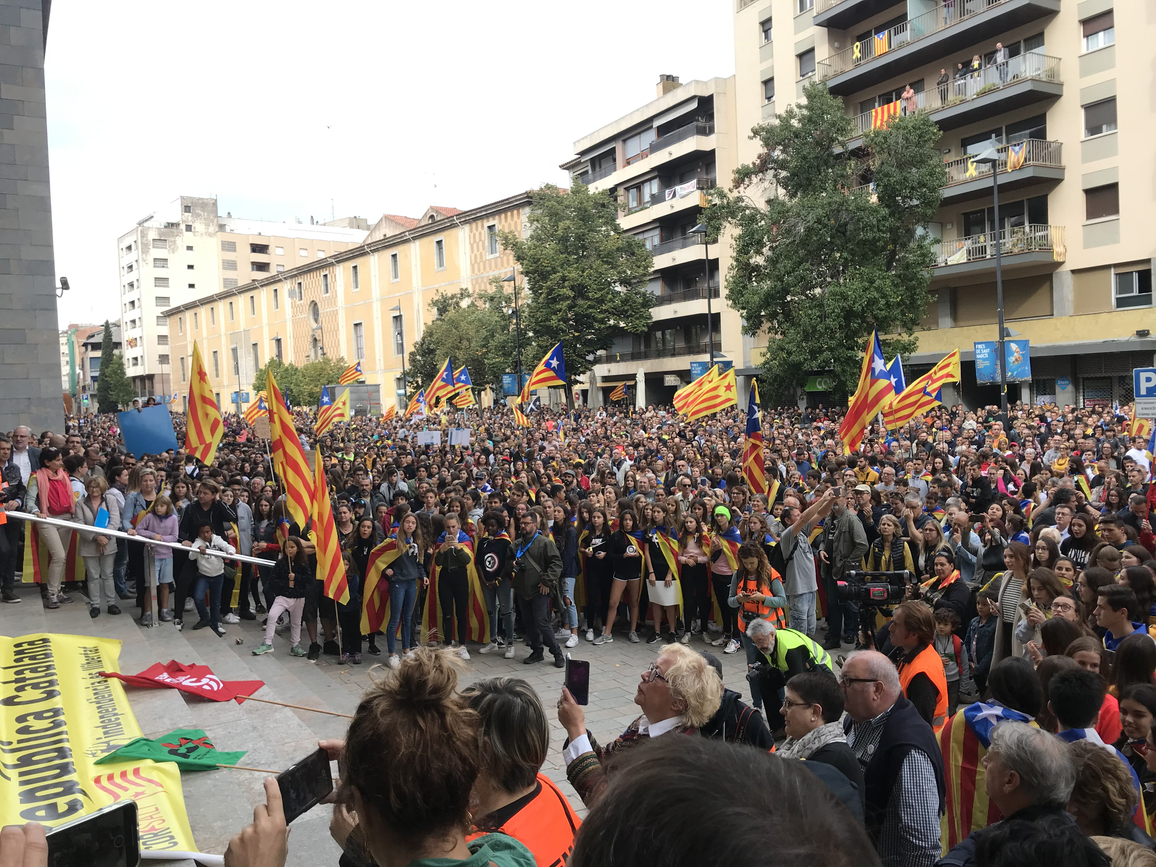 Vaga general del 18 d'octubre a Girona. Manifestació central davant de la seu de la Generalitat